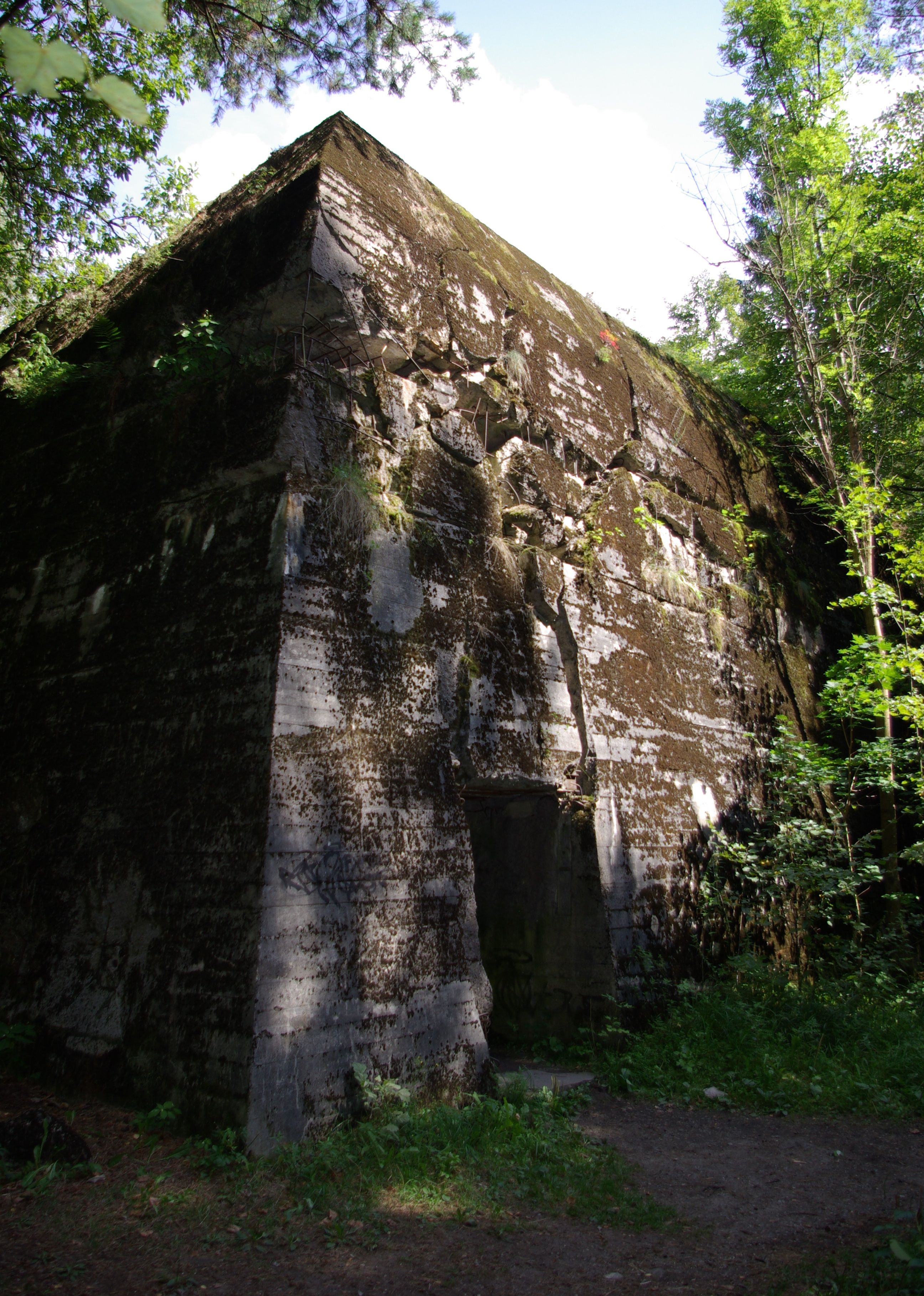 Kwatera Himmlera Hochwald